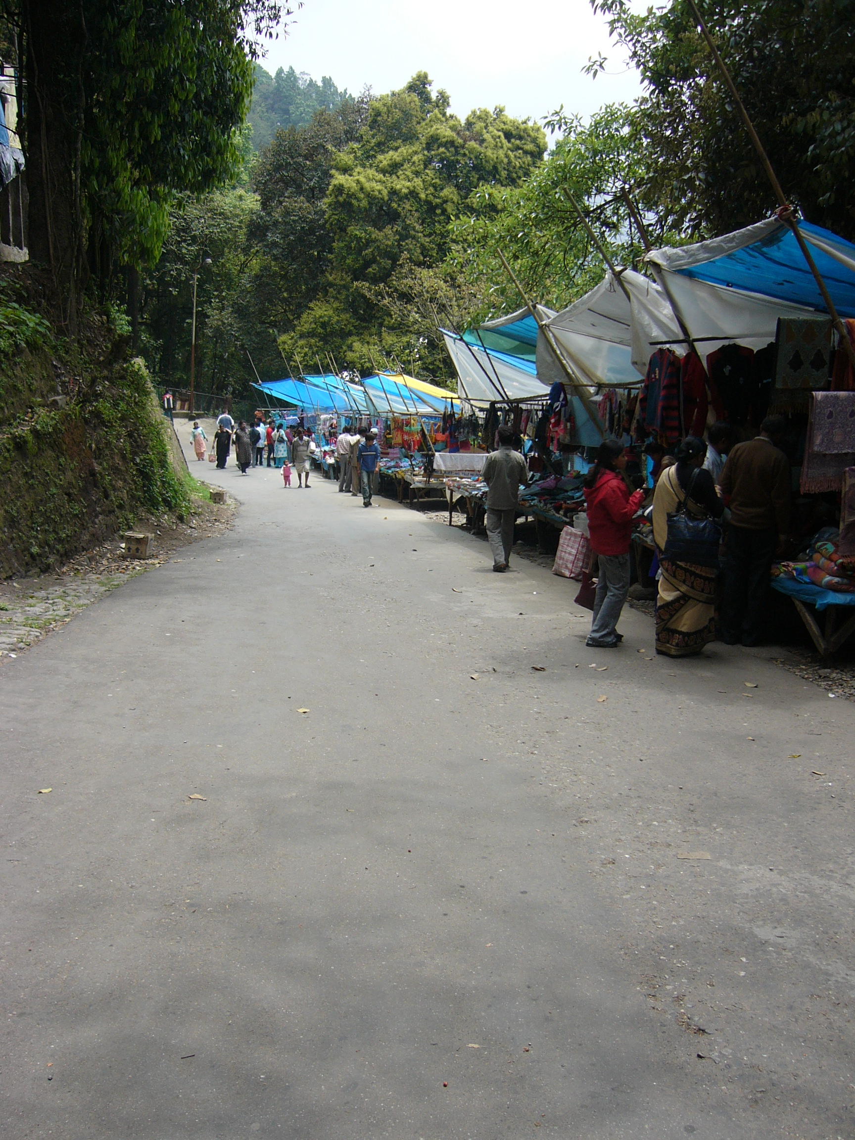 Padmaja Naidu Himalayan Zoological Park